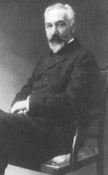 Марко Леко (1853-1932), хемичар Извор